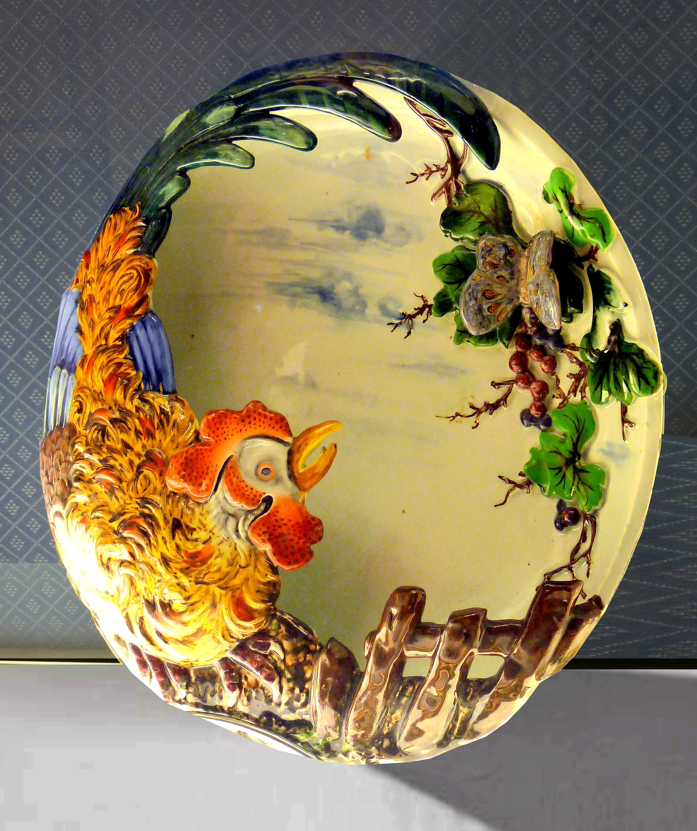 Auguste Majorelle (1825-1879), Coq et papillon sur une treille, plat d'ornement en faïence de Lunéville, 1875, Musée Charles de Bruyères à Remiremont.